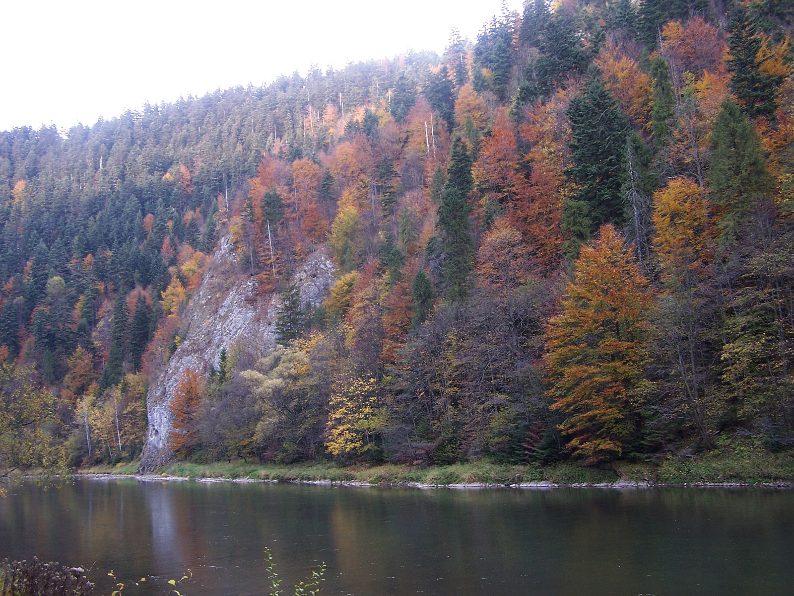 Przełom Dunajca w Pieninach. Świnia Skała.